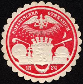 Sealing stamp Title: Coelnisches Gymnasium Description: rot, weiß, geprägt Place: Cöln, Köln size: 4 cm